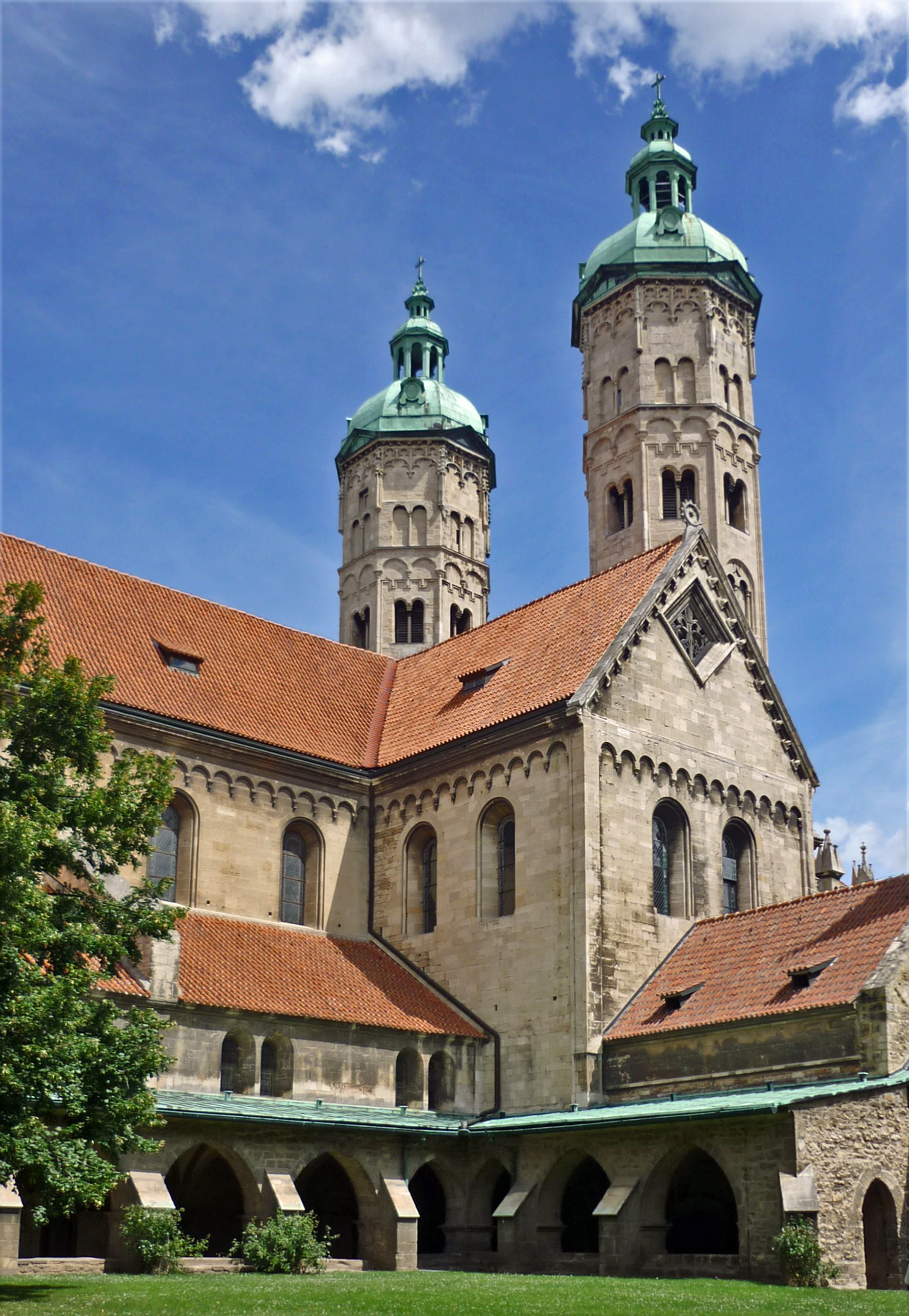 Türme des Doms zu Naumburg an der Saale